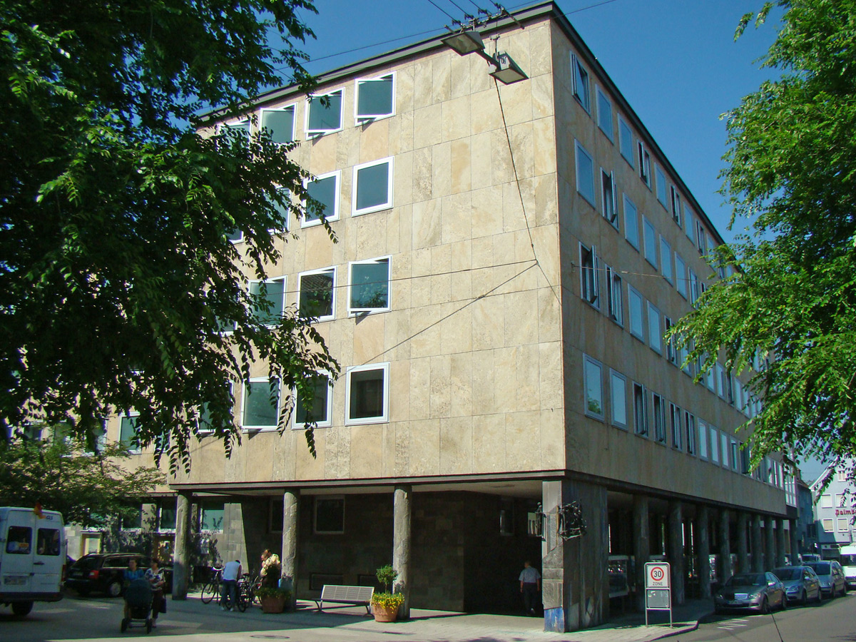 Fünfgeschossiger Erweiterungsbau des Rathauses in Heilbronn